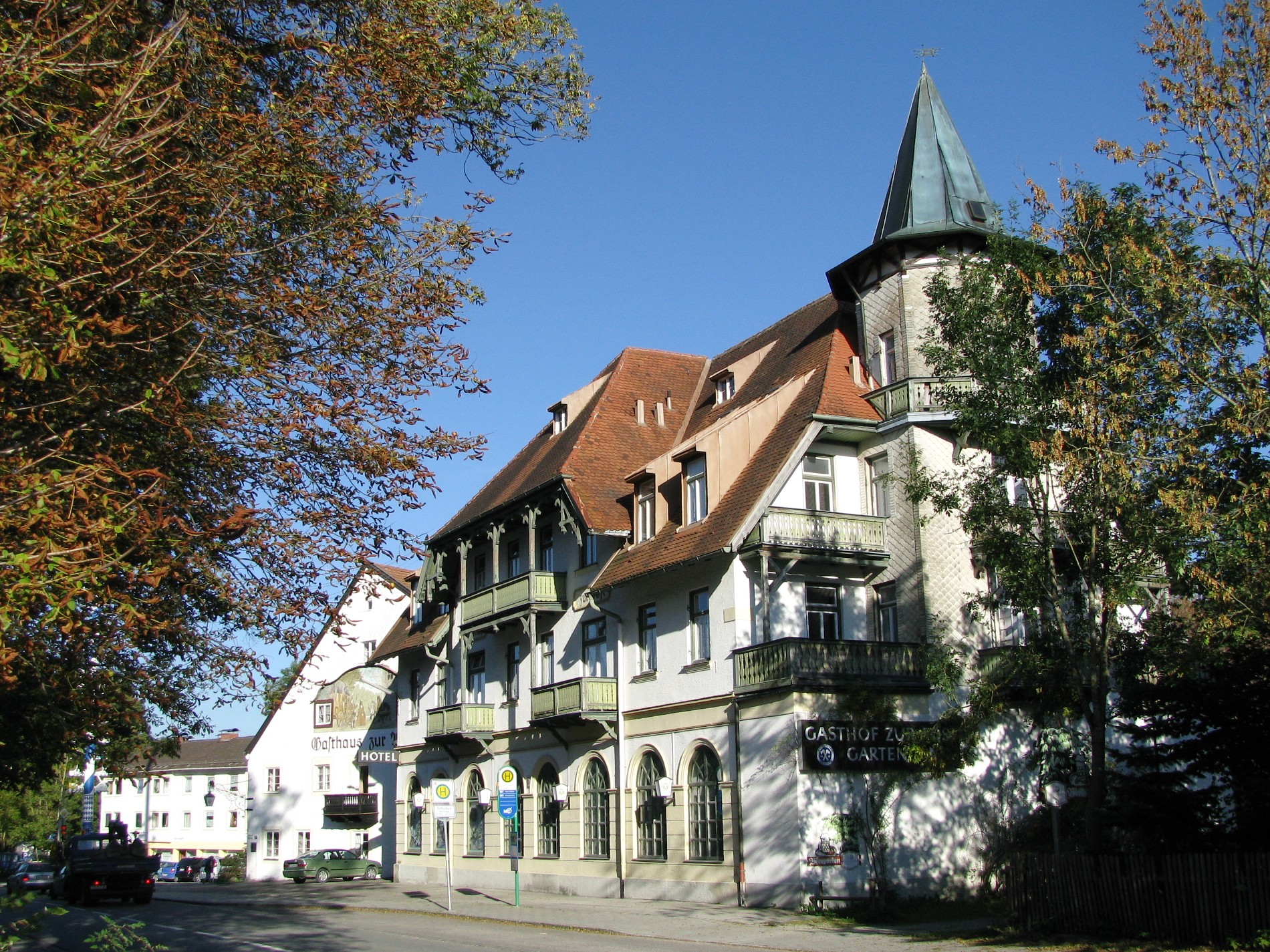 Schäftlarn, Ortsteil Ebenhausen, Wolfratshauser Straße 45; Ehem. Klostertaverne und Poststation, jetzt Gasthof zur Post